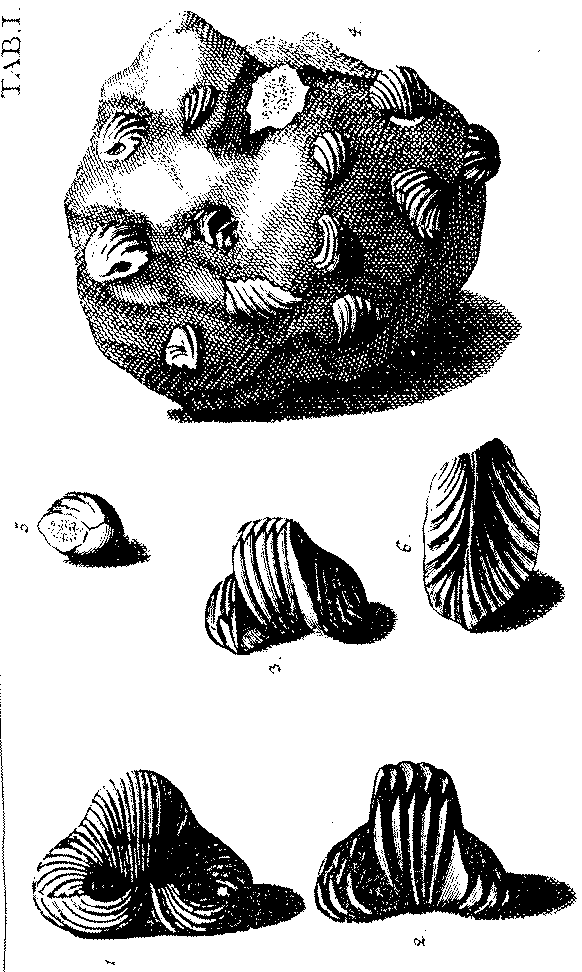 Lamina I del tratado "Aparato para la Historia Natural Española", escrito por José Torrubia en el año 1754